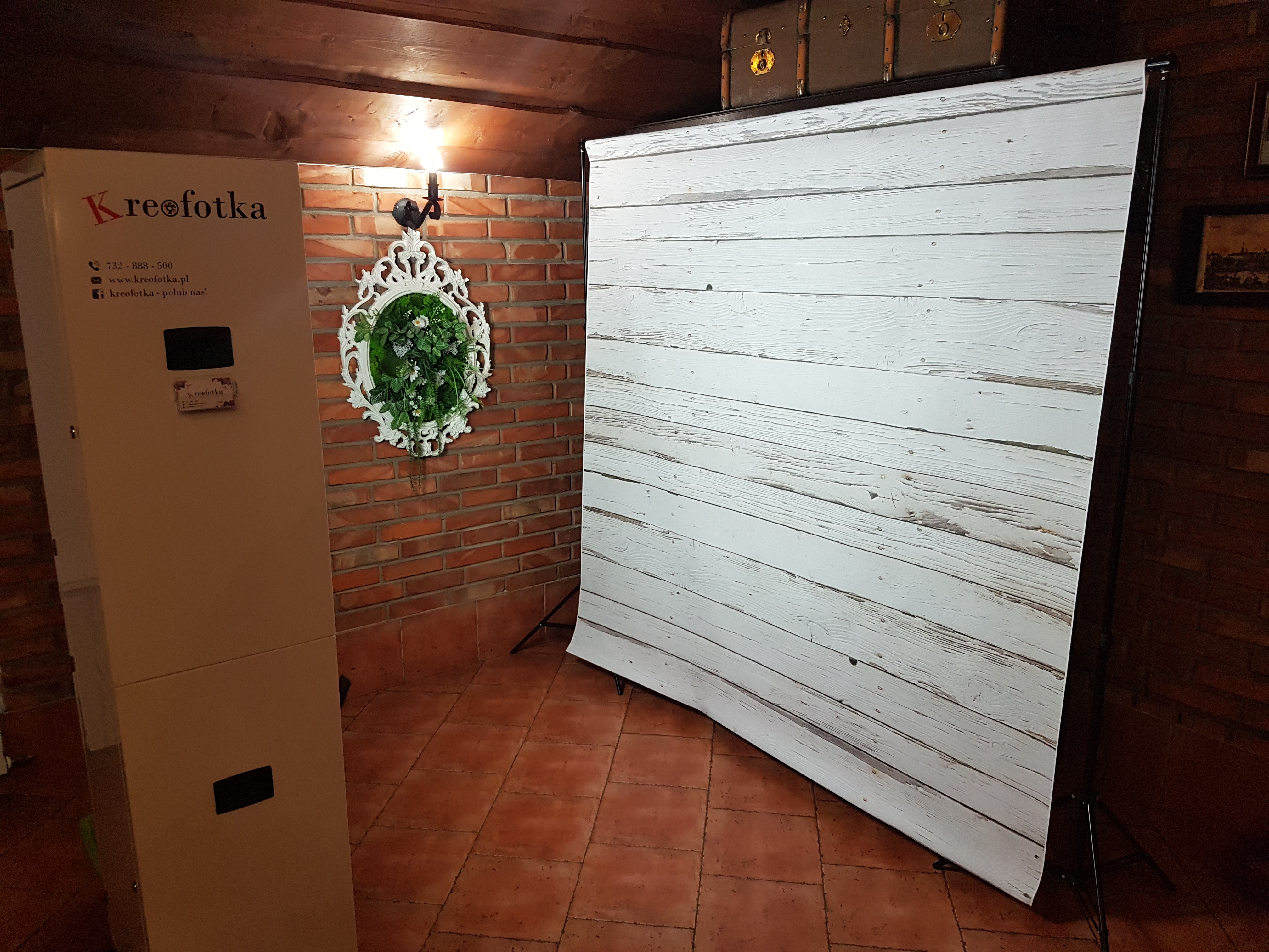 Wesele 03.08.19 Fotobudka